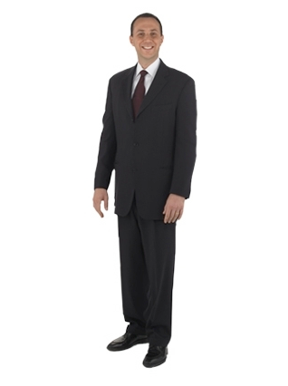 version recadrée et écrasée du fichier wikimedia correspondant.